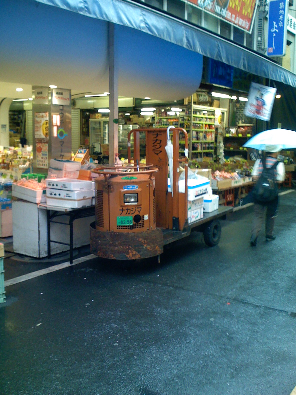 Turret Truck at Tsukiji market Tokyo